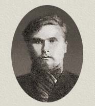 Karl Adamovich Ivanajnen